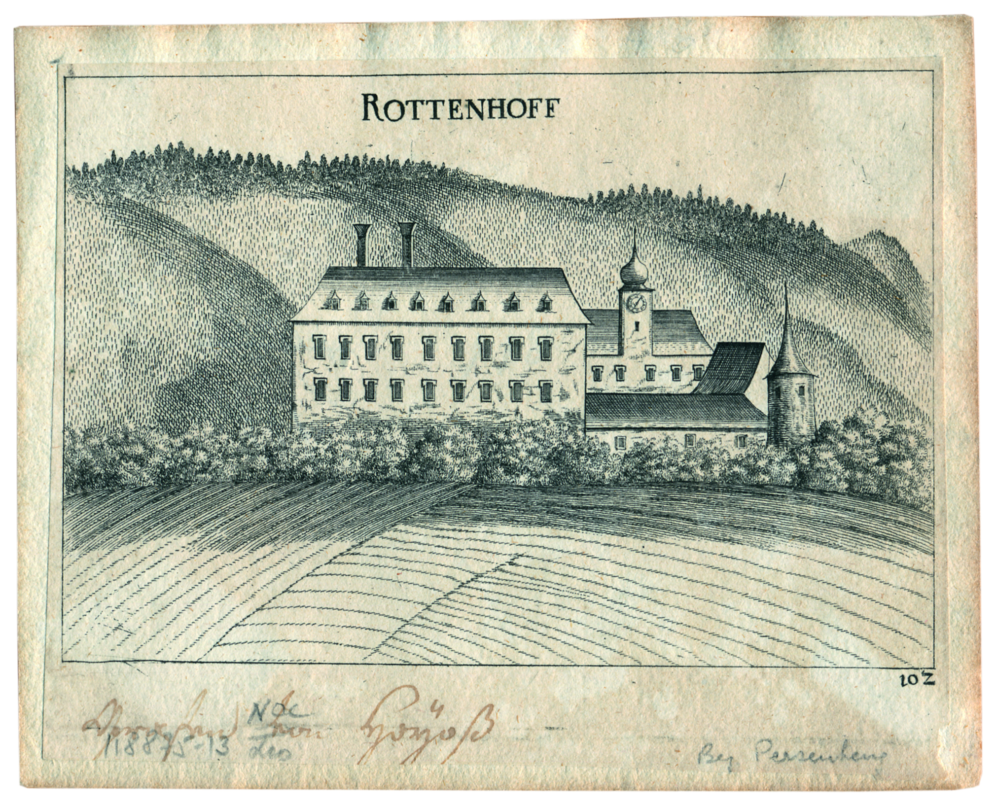 Der Rottenhof in der Gemeinde Hofamt Priel; Kupferstich aus Georg Matthäus Vischer, Topographia. Archiducatus Austriae Inferioris Modernae, 1672